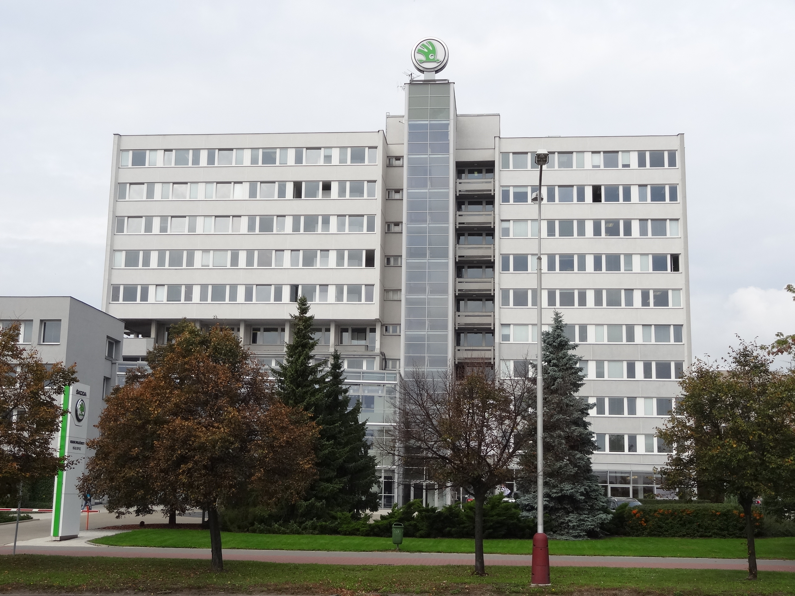 Škoda headquarter